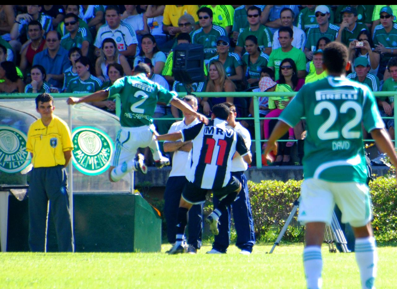 Última rodada do Brasileirão 2007, Palmeiras 1 x 3 Atlético Mineiro.